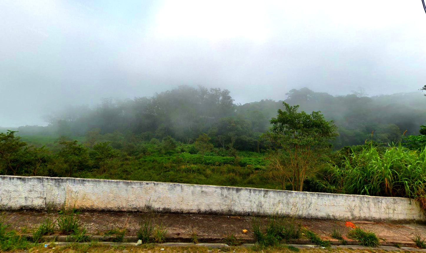 Vista do Ribeirão Pires, aquífero que dá nome à cidade homônima